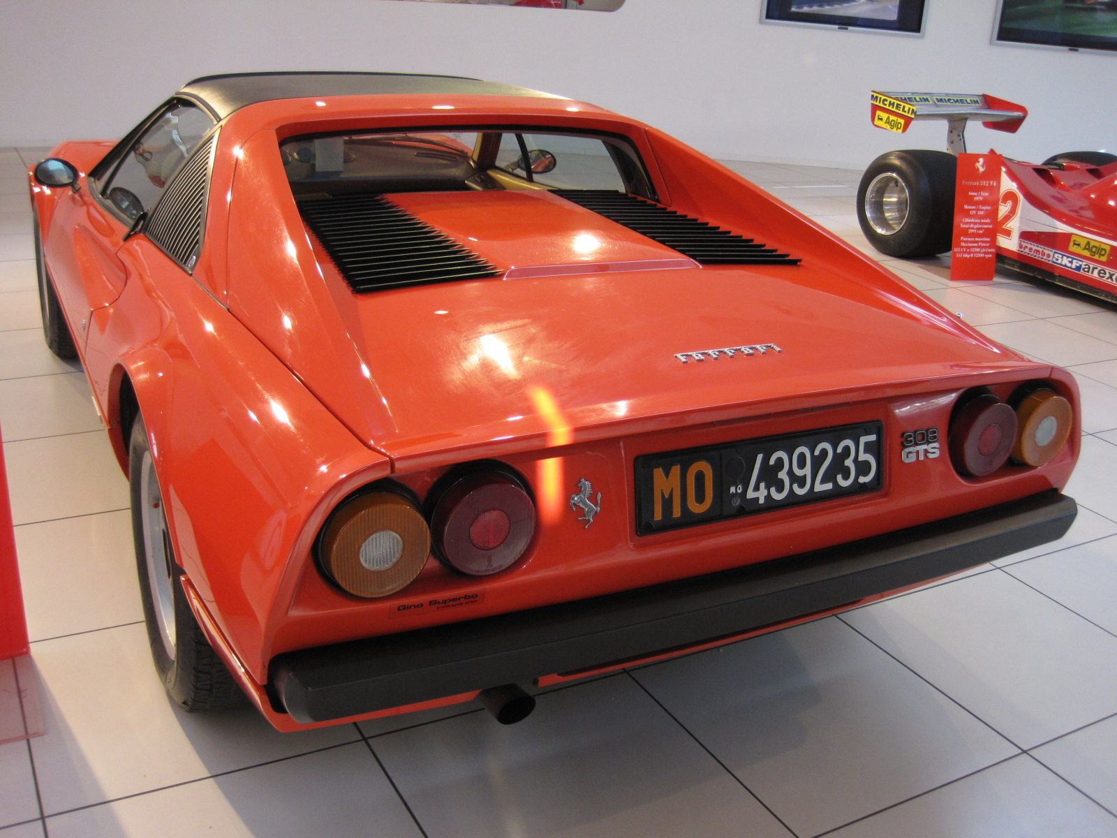 Automobiles in the Galleria Ferrari - Ferrari 308 GTS - 1978 - V8 - 2,9 litres